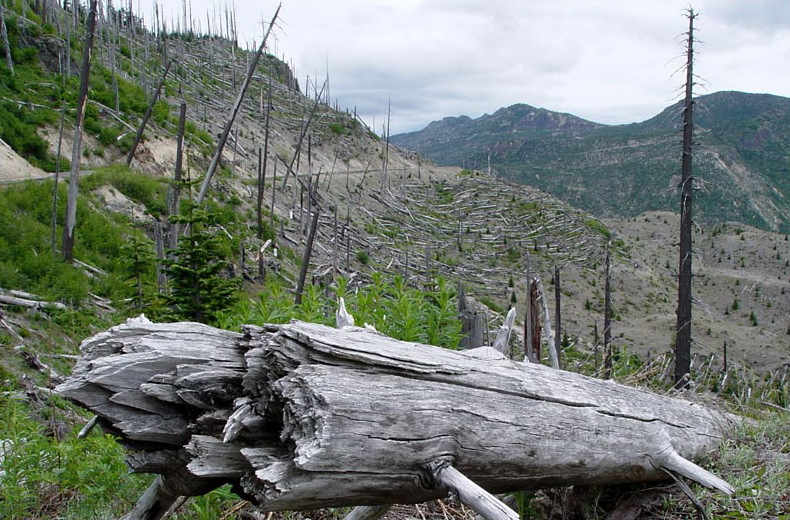 Am Mount Saint Helens